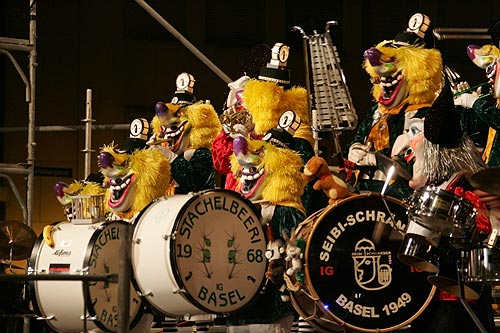 Basler Fasnacht 05: Stachelbeeri und Seibi-Schränzer (Guggekonzäärt)